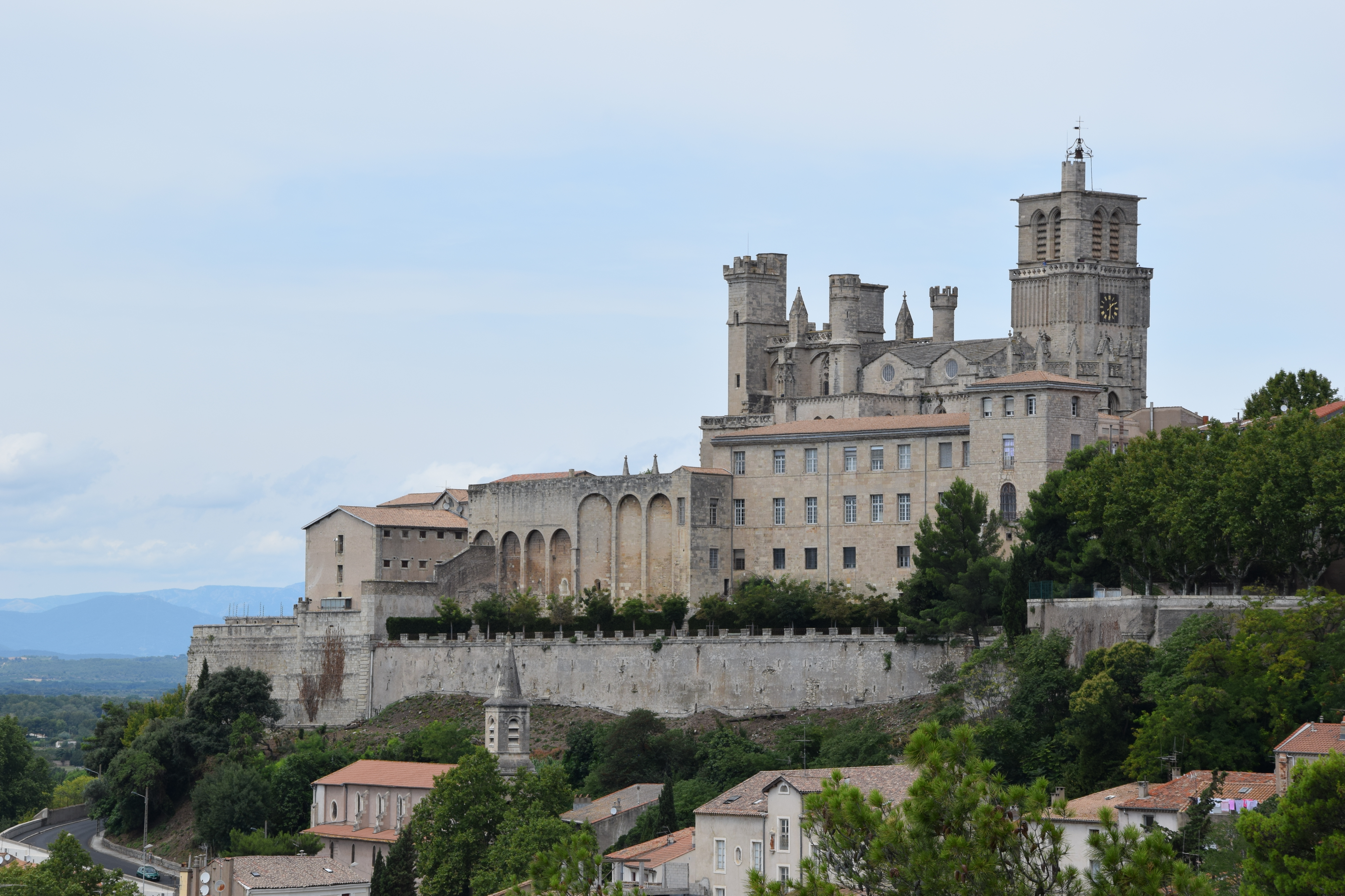 Cathédrale Saint-Nazaire .